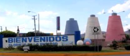 Glorieta de la amistad